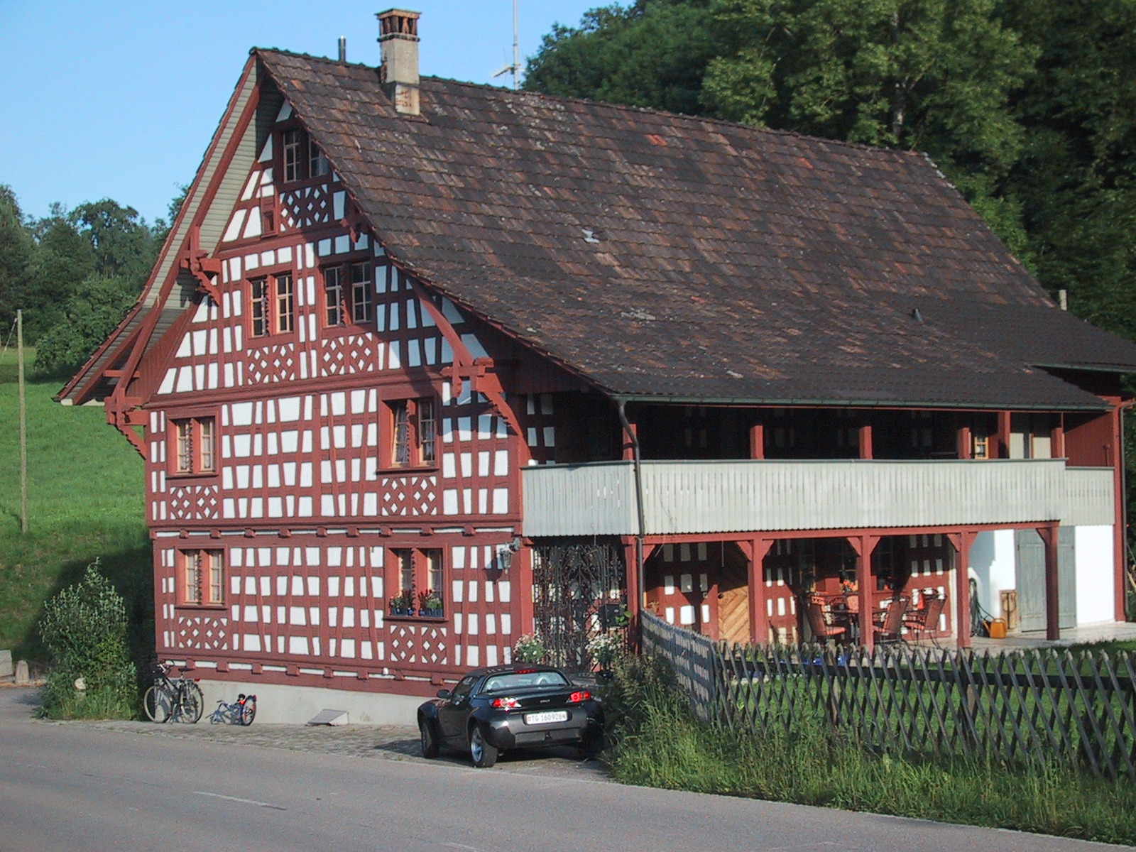 Riegelhaus in Buhwil in Kradolf-Schönenberg (Kanton Thurgau, Schweiz) an der Dorfausfahrt nach Neukirch.